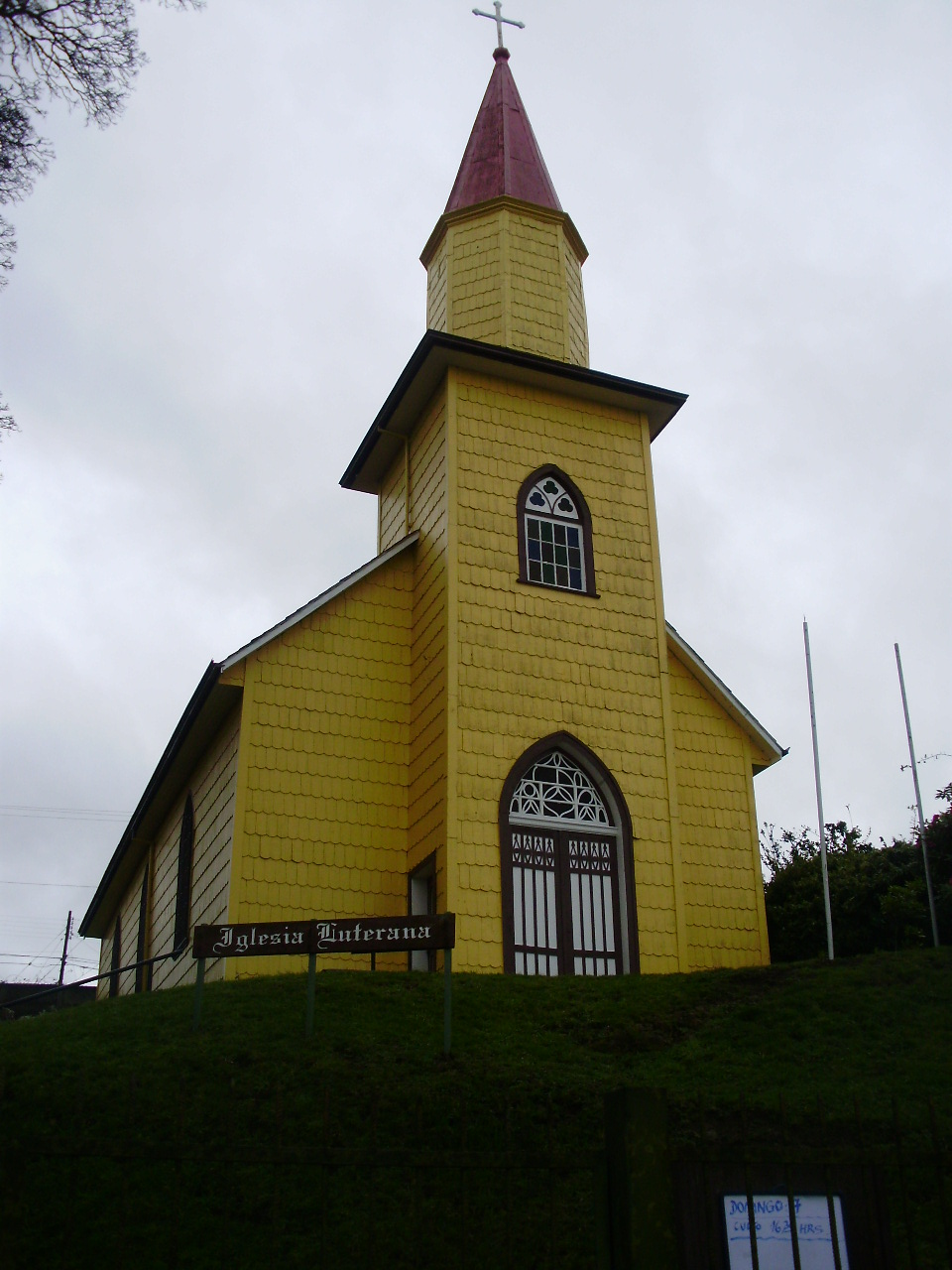 Iglesia luterana de Puerto Varas This is a photo of a national monument in Chile: 720